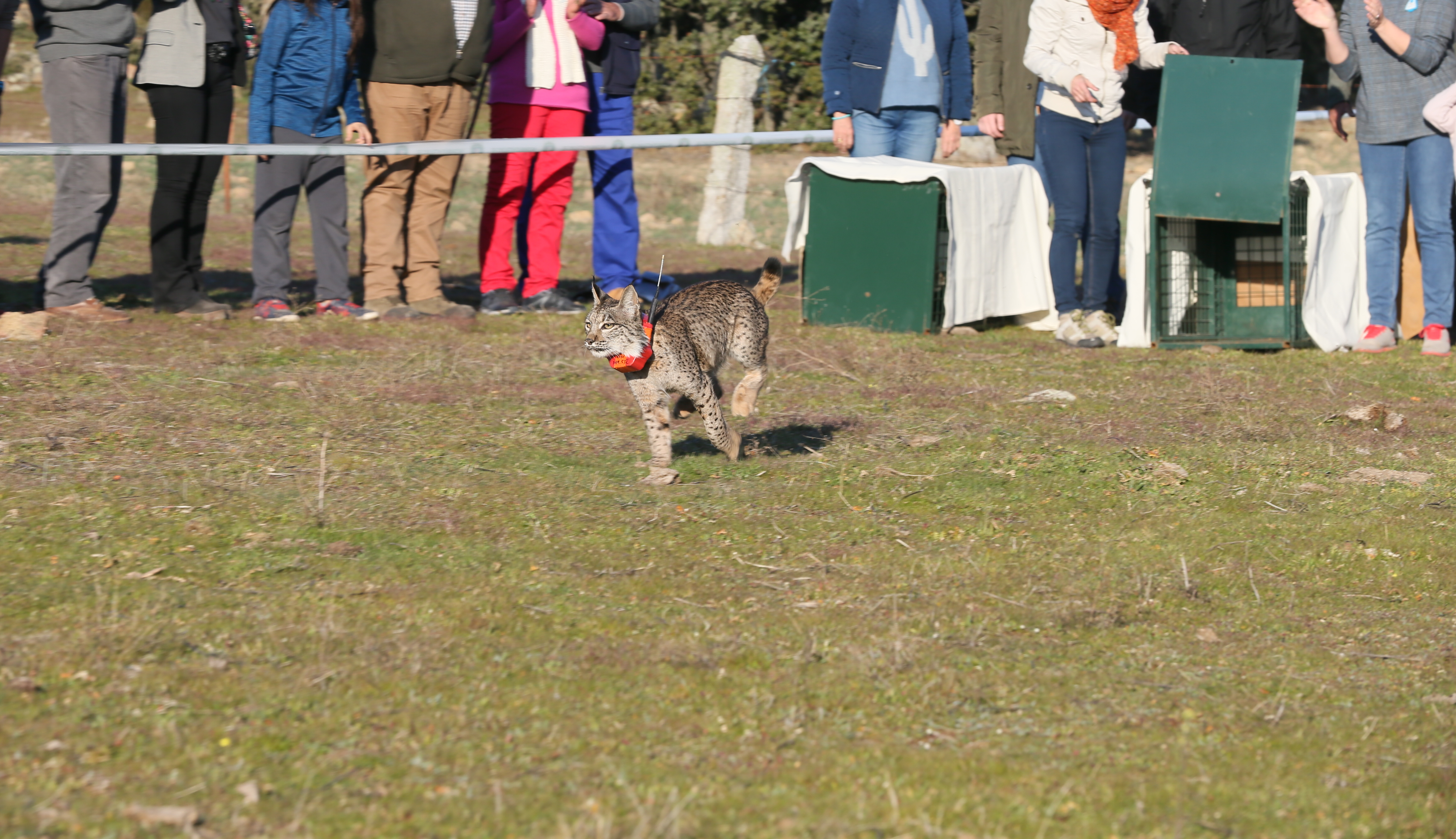 MENASALBAS (Toledo), 13 de febrero de 2019.- La directora del Instituto de la Mujer, Araceli Martínez, y el portavoz del Gobierno regional, Nacho Hernando, asisten, en Menasalbas, a la suelta de dos ejemplares de lince. (Fotos: Ignacio López // JCCM)